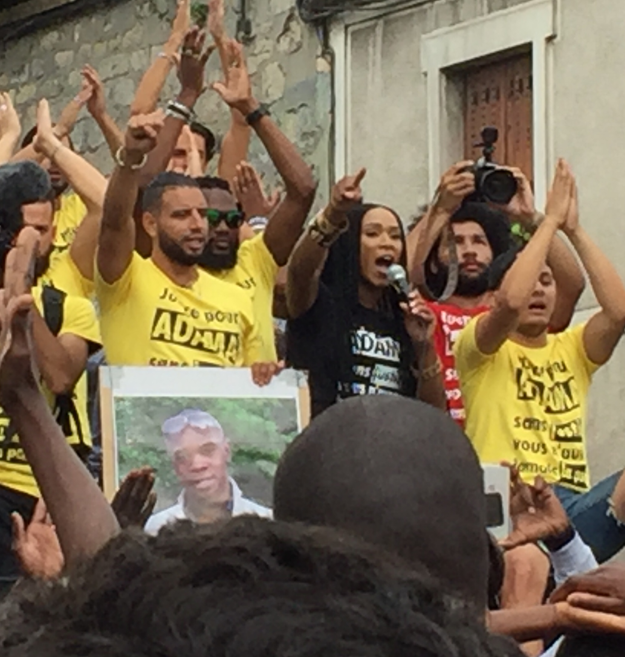 Lors de la « Marche pour Adama », en soutien à Adama Traoré mort à la gendarmerie de Persan en juillet 2016. Assa Traoré au micro sur un camion, en tête de cortège.